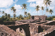 Casa da Torre de Garcia d'Ávila, Bahia, Brazil